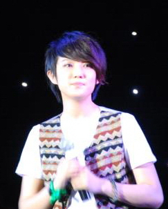 中文（中国大陆）: 刘力扬于2008年6月5日参加在北京星光现场举行的MySpace赈灾义演。